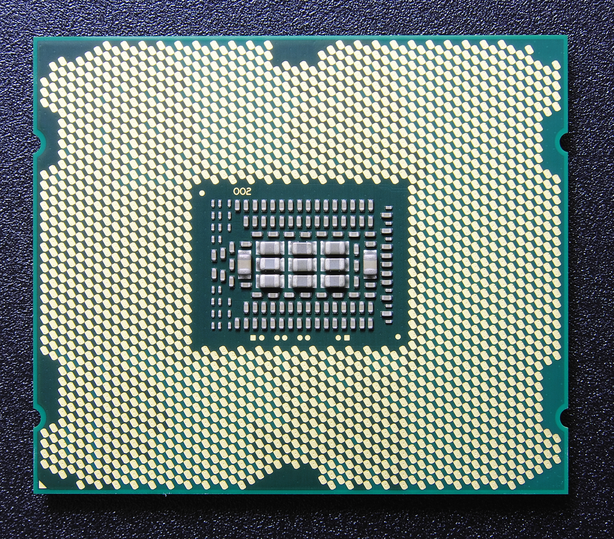 Intel Socket 2011